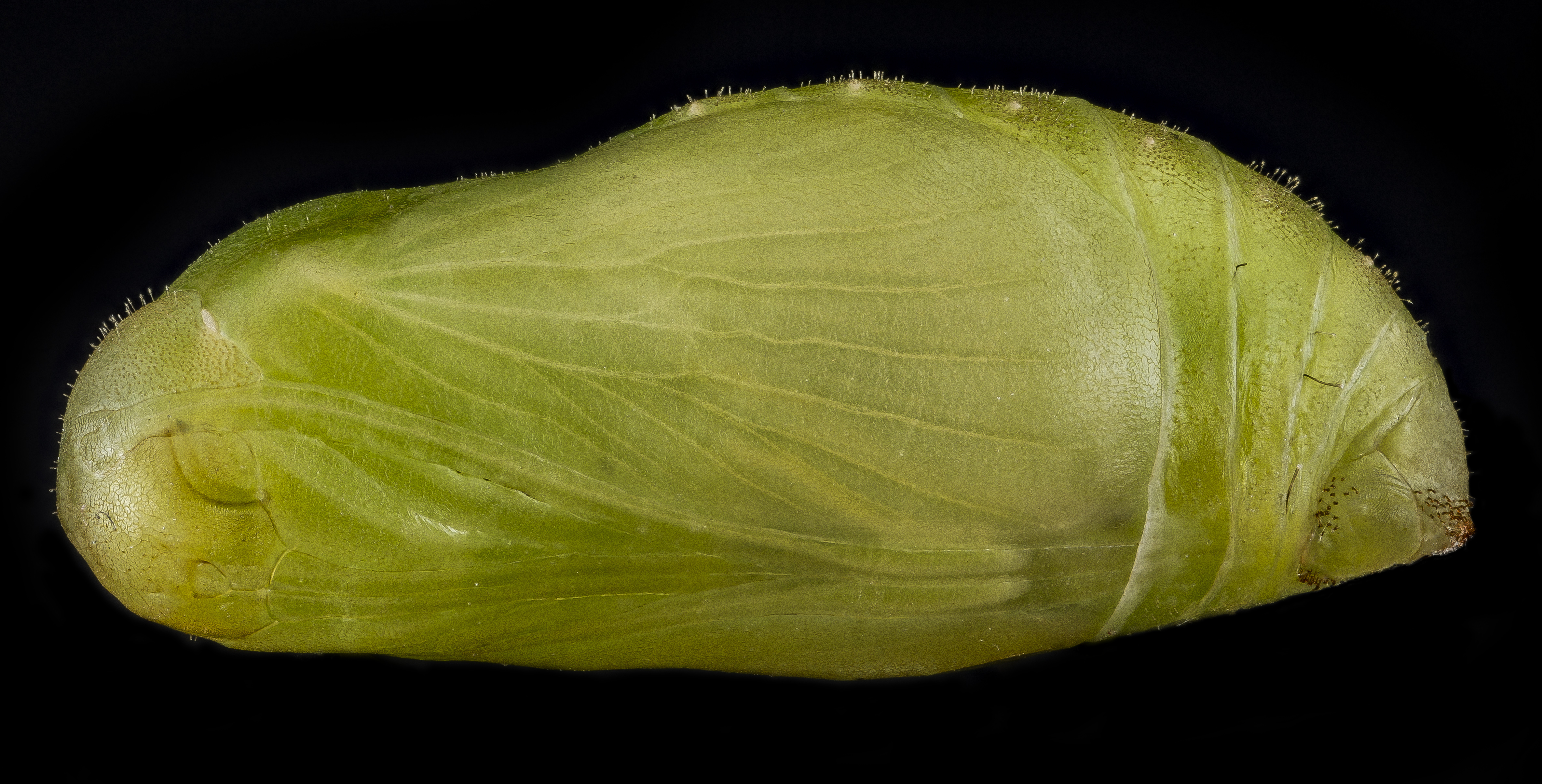 Pupa of endangered Karner Blue Butterfly Plebejus melissa samuelis